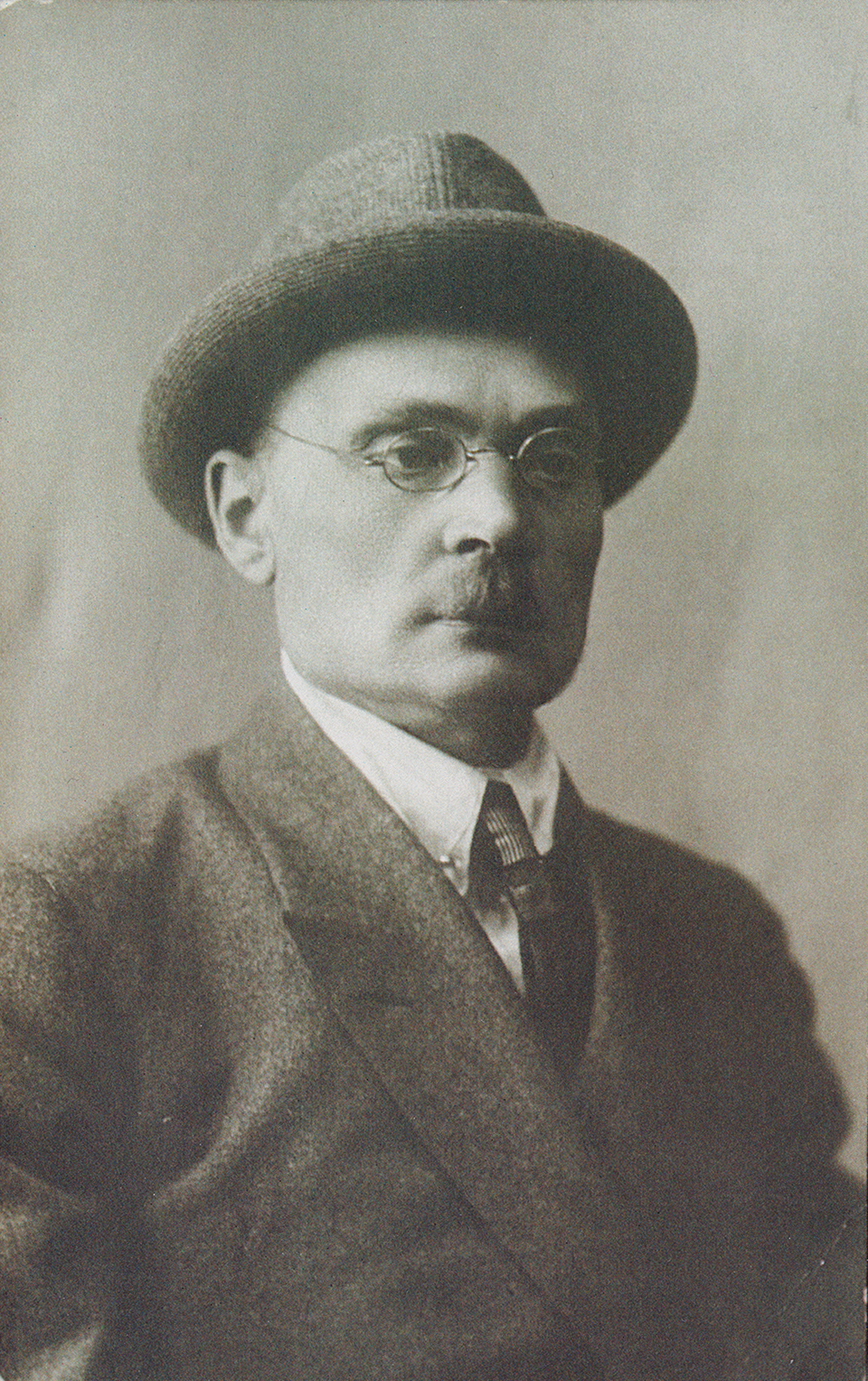 Беларуская (тарашкевіца): Язэп Лёсік, 1930-я гг. Архіў Алесі Лёсік.